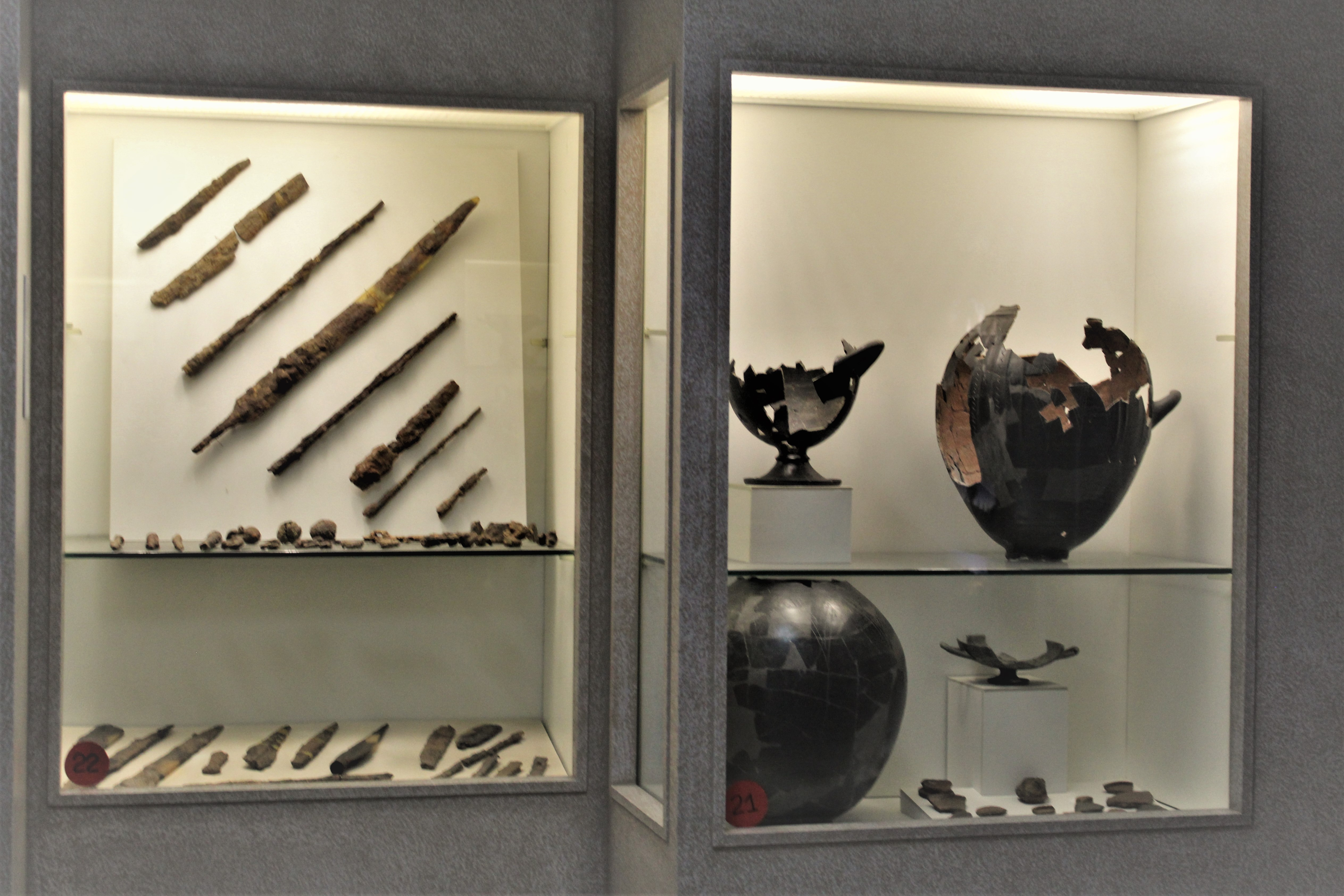 Vetrine Età del Ferro, piano 1, sala 3; Museo Archeologico di Magliano Sabina